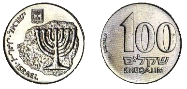 Израильские 100 шекелей 1984 года выпуска. Аверс и реверс.